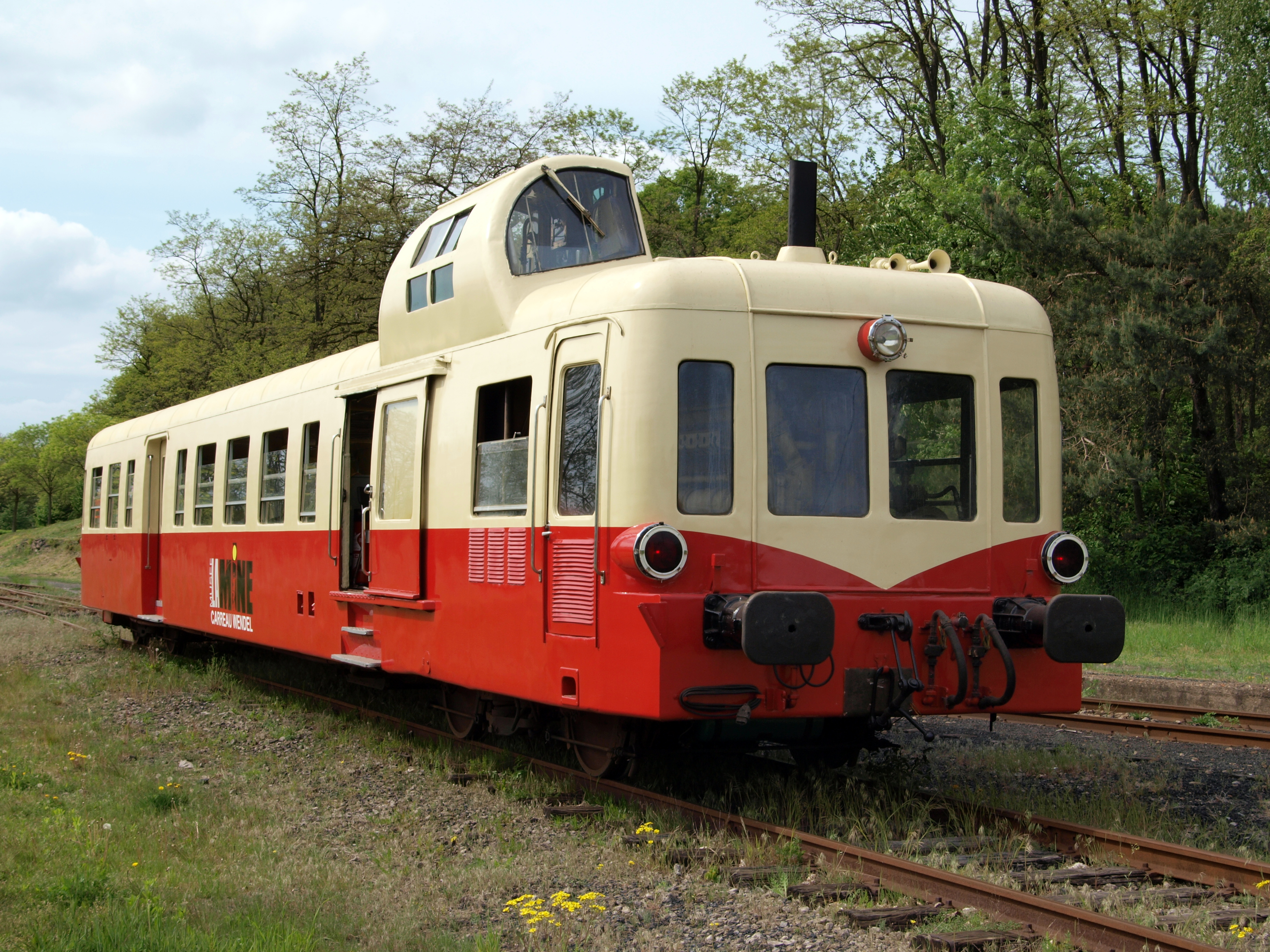 Mine museum diesel locomotive autorail Picasso X4042 at Petite-Rosselle